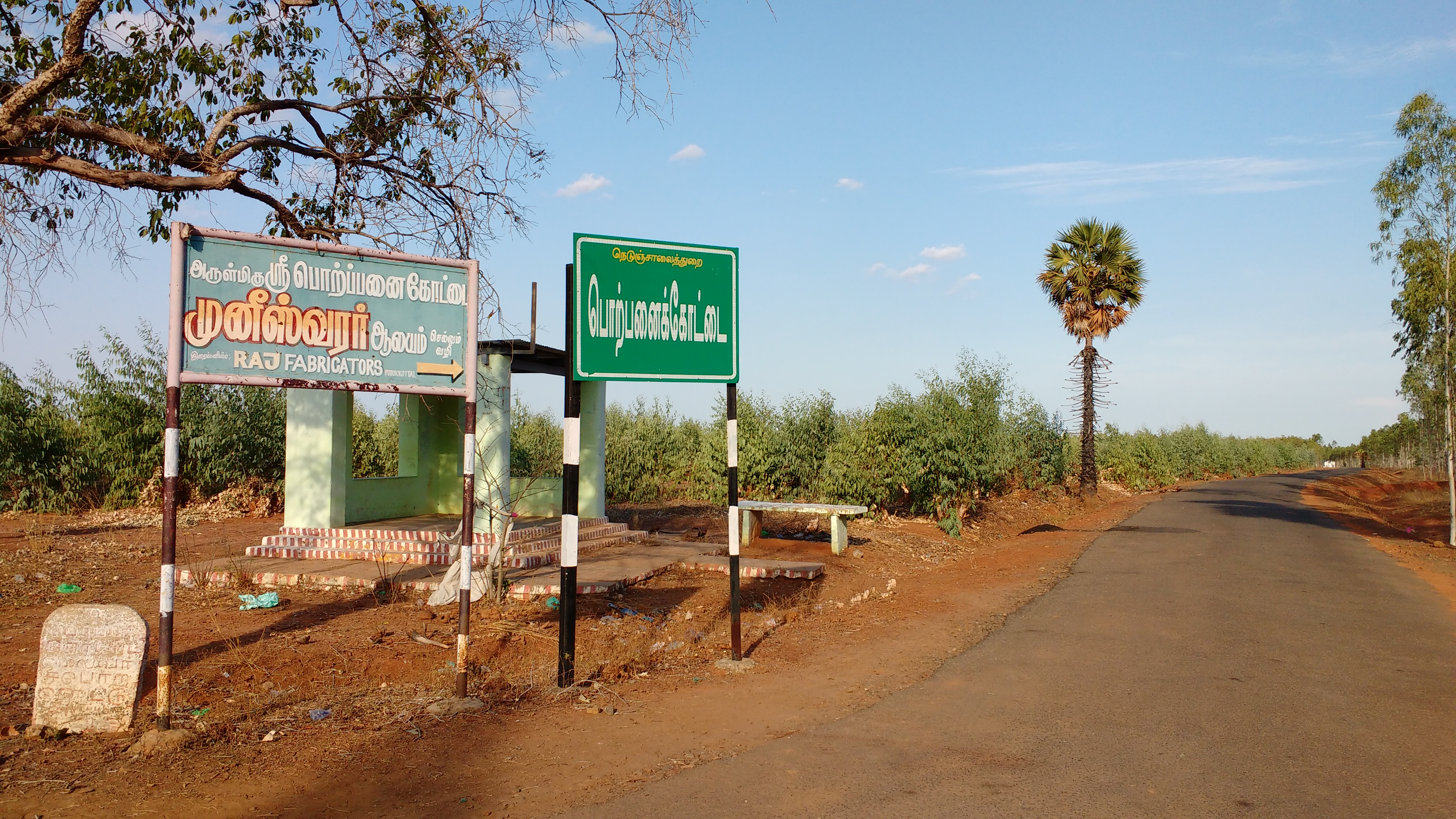 பொற்பனைக்கோட்டை பெயர்பலகை Where is it???